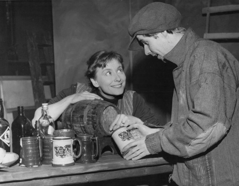 "Den ordinarie teatersäsongen i Stockholm lider mot sitt slut, men staden kommer inte att bli teaterlös för det. Sommarscenerna tar vid och på måndagen var det kostymrepetition på Teater Artist vid Grev Turegatan. Där tänker man trotsa sommarvädret med ett av dramatikens stora mästerverk, irländaren Synges "Hjälten på den gröna ön". Premiären äger rum nu på fredag." Annie Jenhoff och Sven Wollter. Införd i Svenska Dagbladet 31/5 1960.